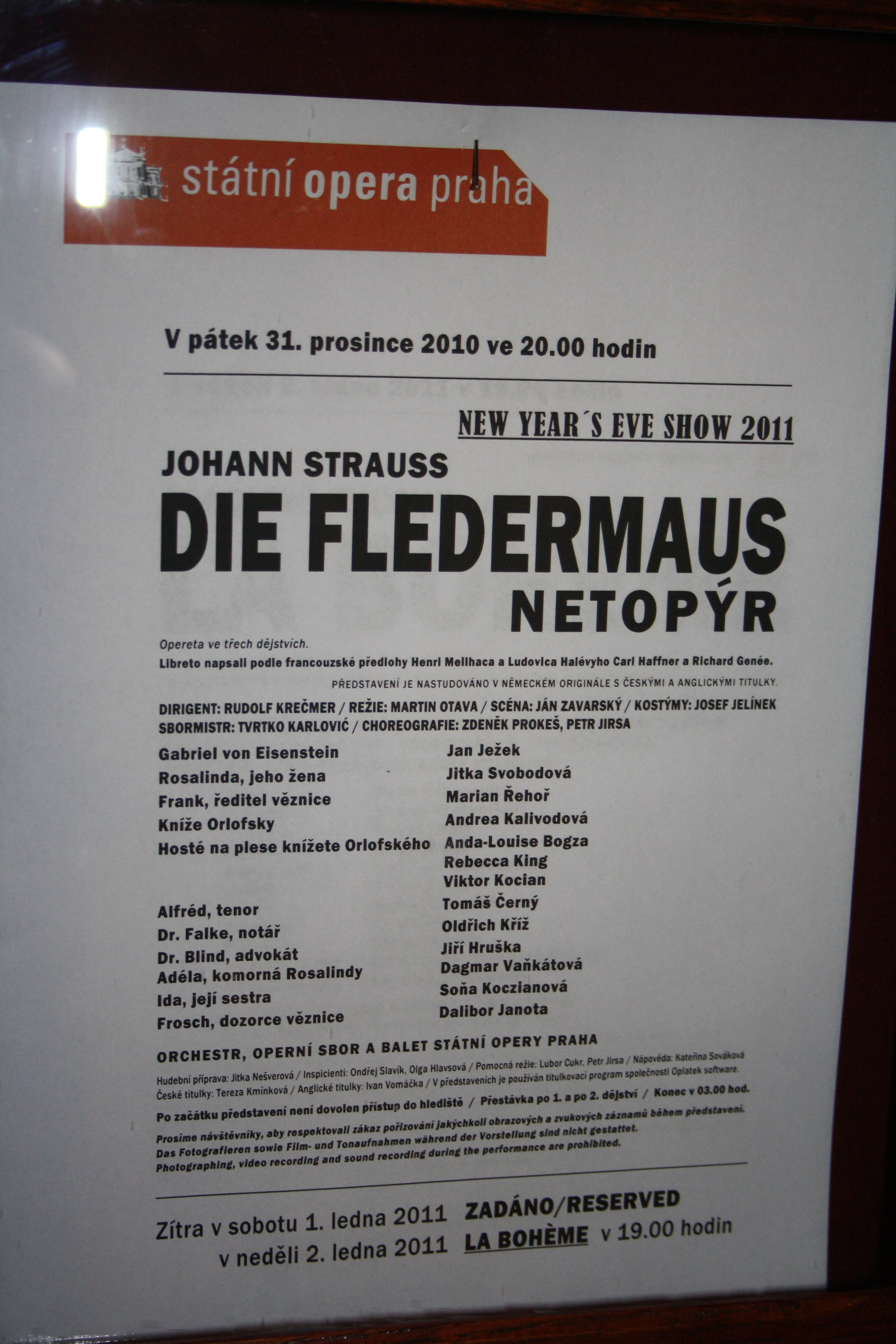 Státní opera